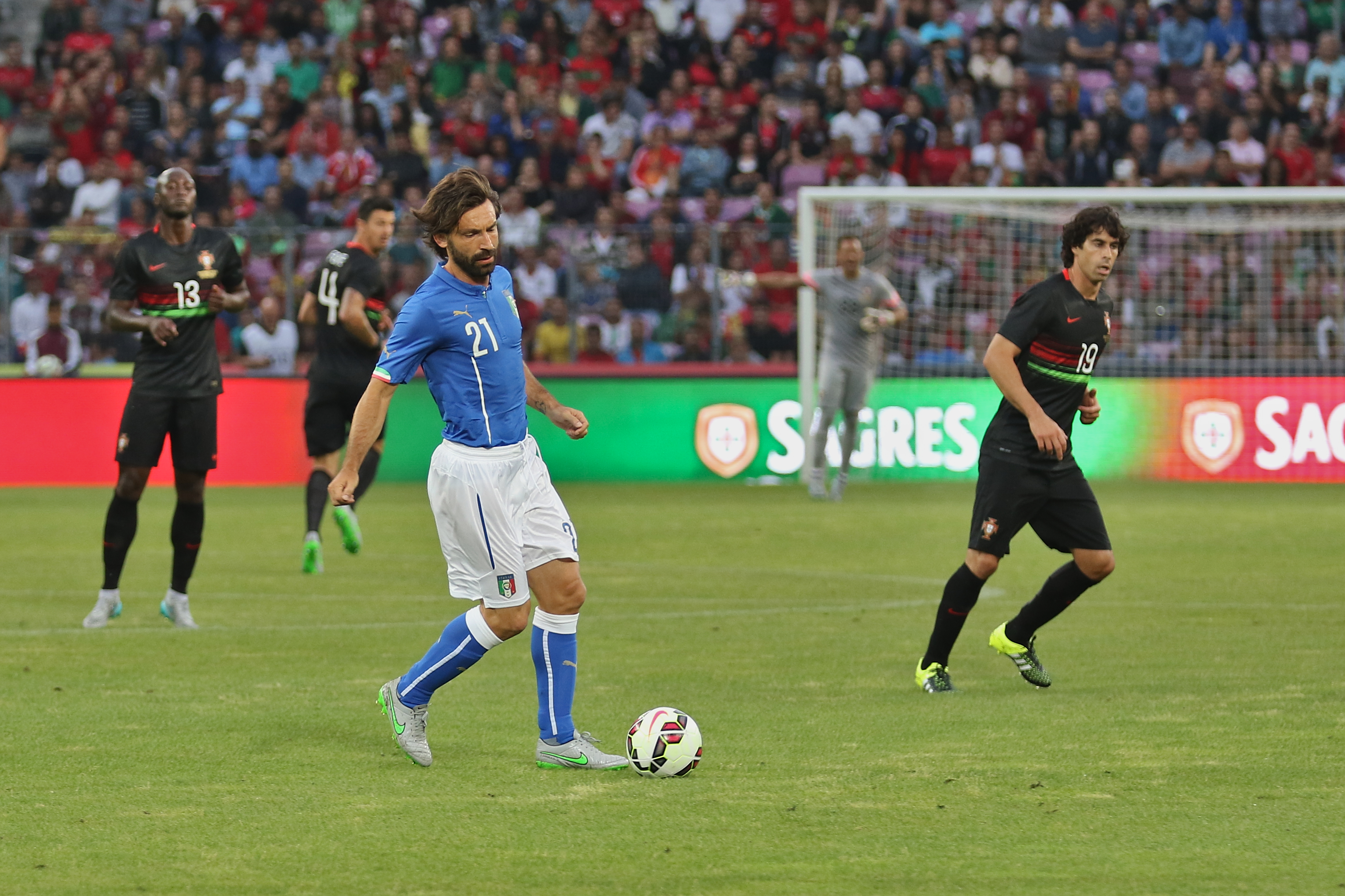 20150616 - Portugal - Italie - Genève - Andrea Pirlo